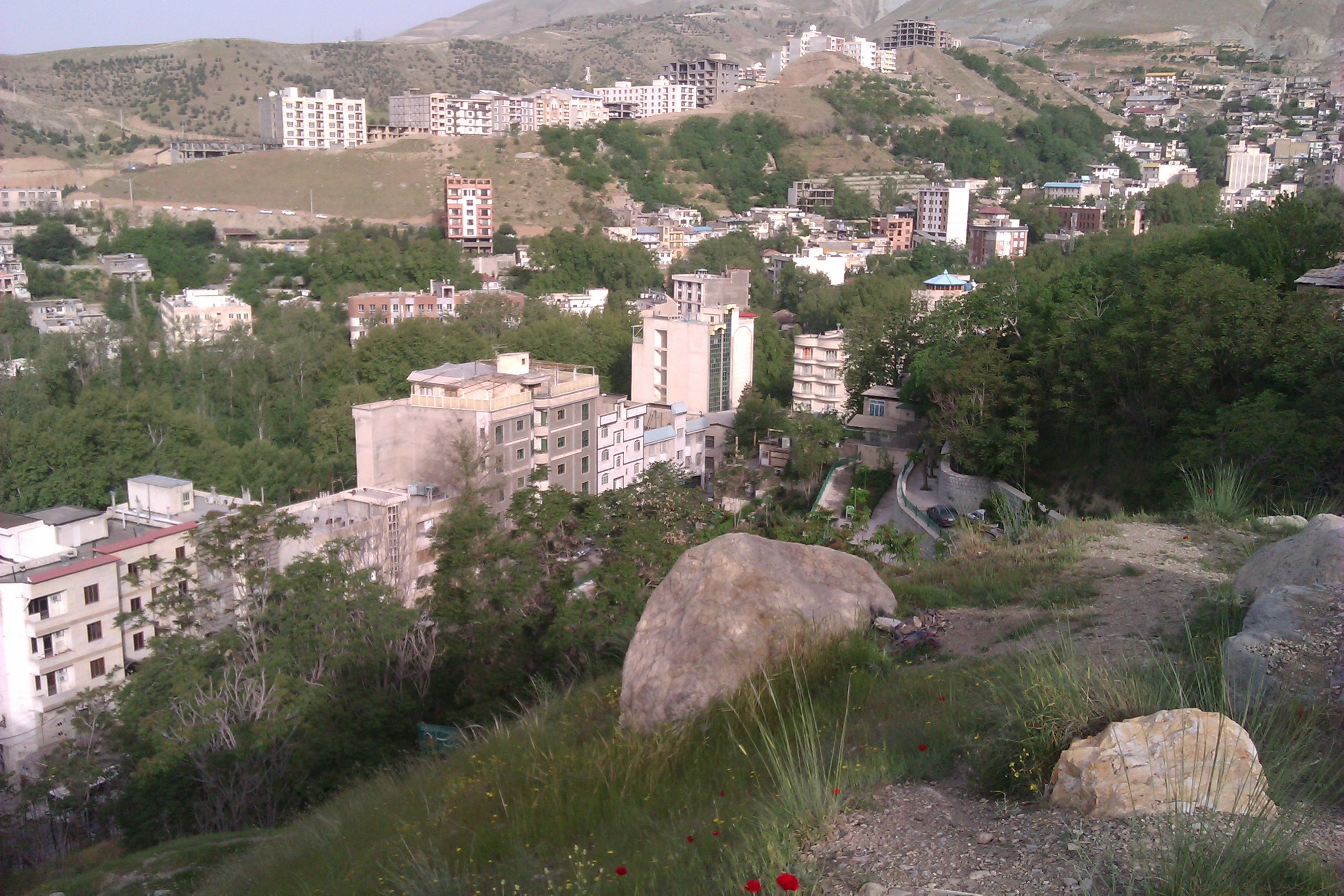 Evin, Tehran, Iran